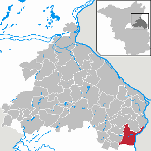 Lebus in Brandenburg (Country) - District Märkisch-Oderland